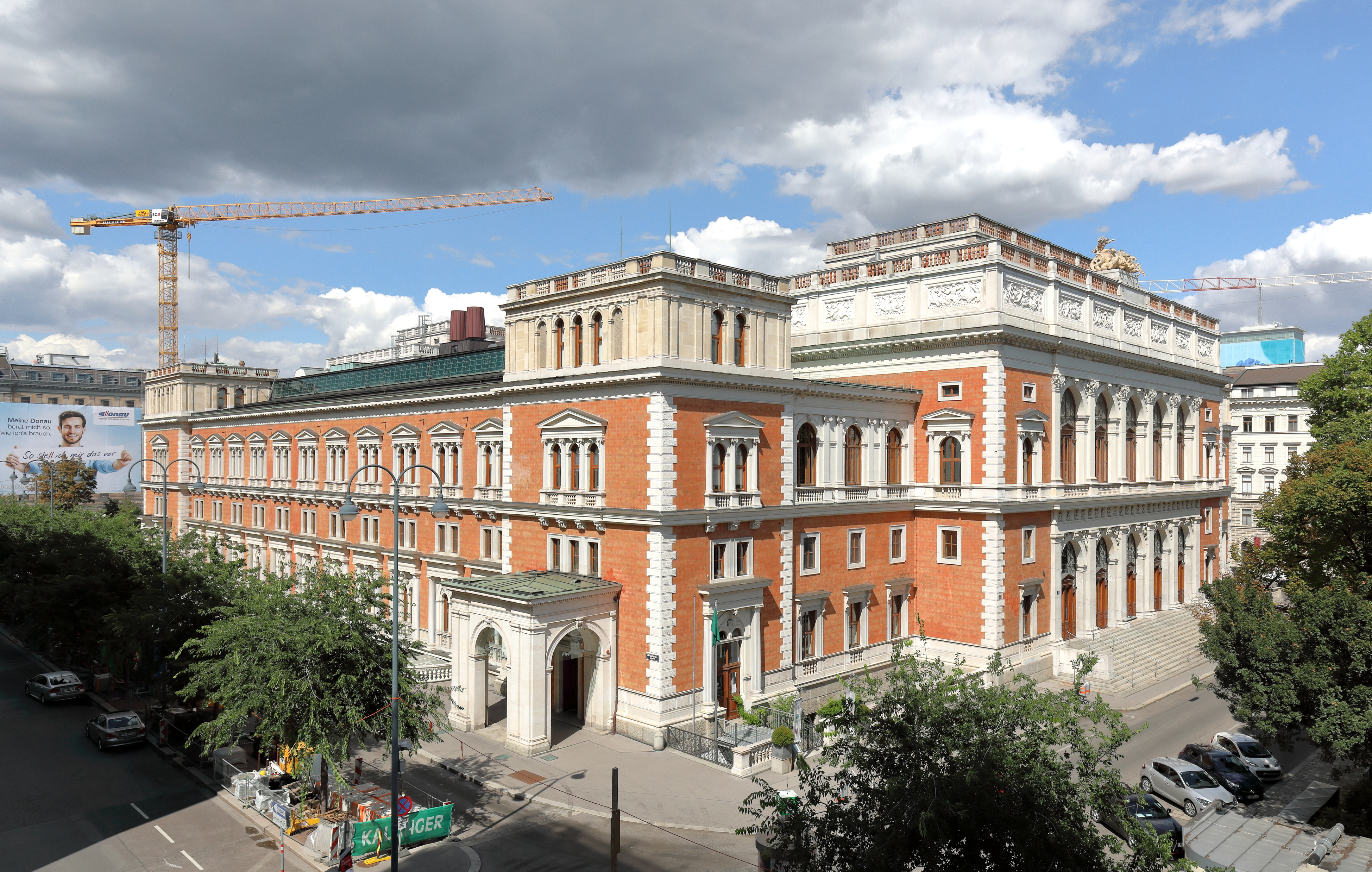 Das ehemalige Börsengebäude am Börseplatz im 1. Wiener Gemeindebezirk Innere Stadt.Das Gebäude wurde von 1874 bis 1877 nach Plänen von Theophil Hansen und Carl Tietz in klassizistischen Renaissanceformen errichtet und am 14. März 1877 von Kaiser Franz Joseph I. eröffnet, wobei die erste Börsenversammlung am 19. März 1877 stattfand. Am 13. April 1956 wurde durch einen Großbrand das Gebäude schwer beschädigt und der Börsenbetrieb konnte erst am 7. Dezember 1959 wieder aufgenommen werden. Nach dem Beschluss die Wiener Börse AG zu privatisieren, wurde die Börsekammer im Juni 1999 aufgelöst und Ende 2001 zog dann die Wiener Börse AG in das Palais Caprara-Geymüller um.